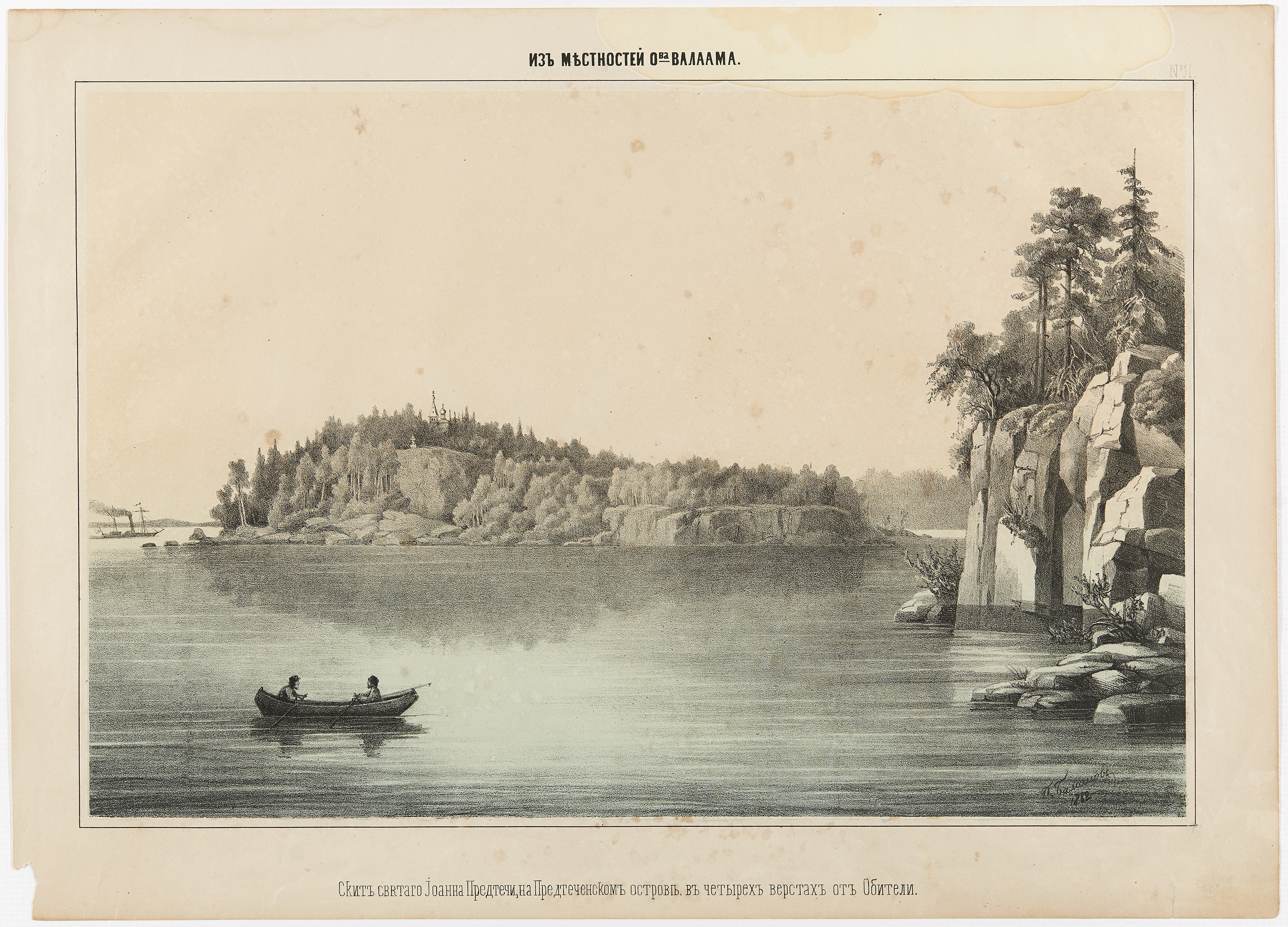 Pyhän Johannes Kastajan skiitta Johannes Kastajan saarella; 4 virstan päässä luostarista. Valamo.